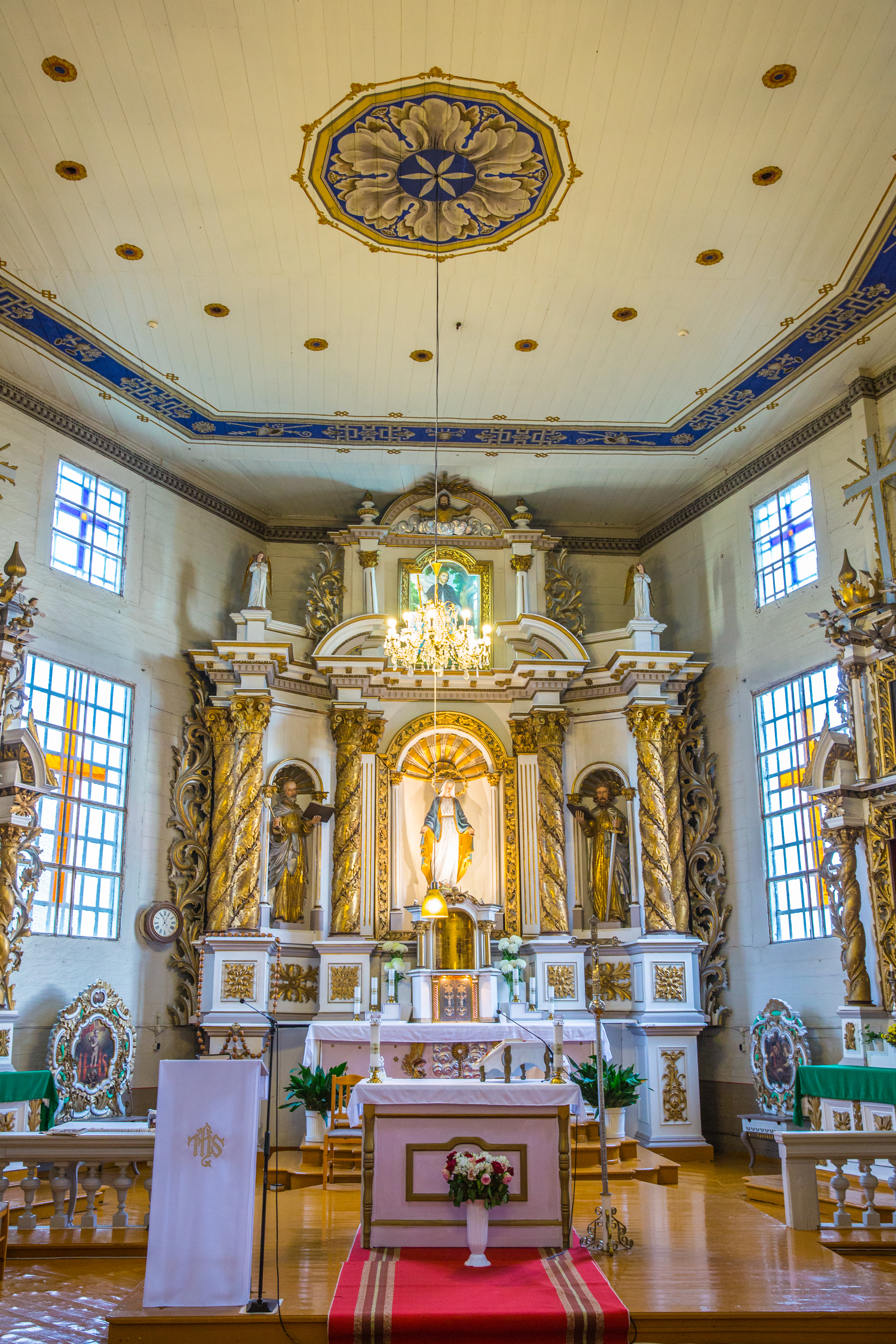 Alsėdžių Švč. M. Marijos Nekaltojo Prasidėjimo bažnyčios vidus